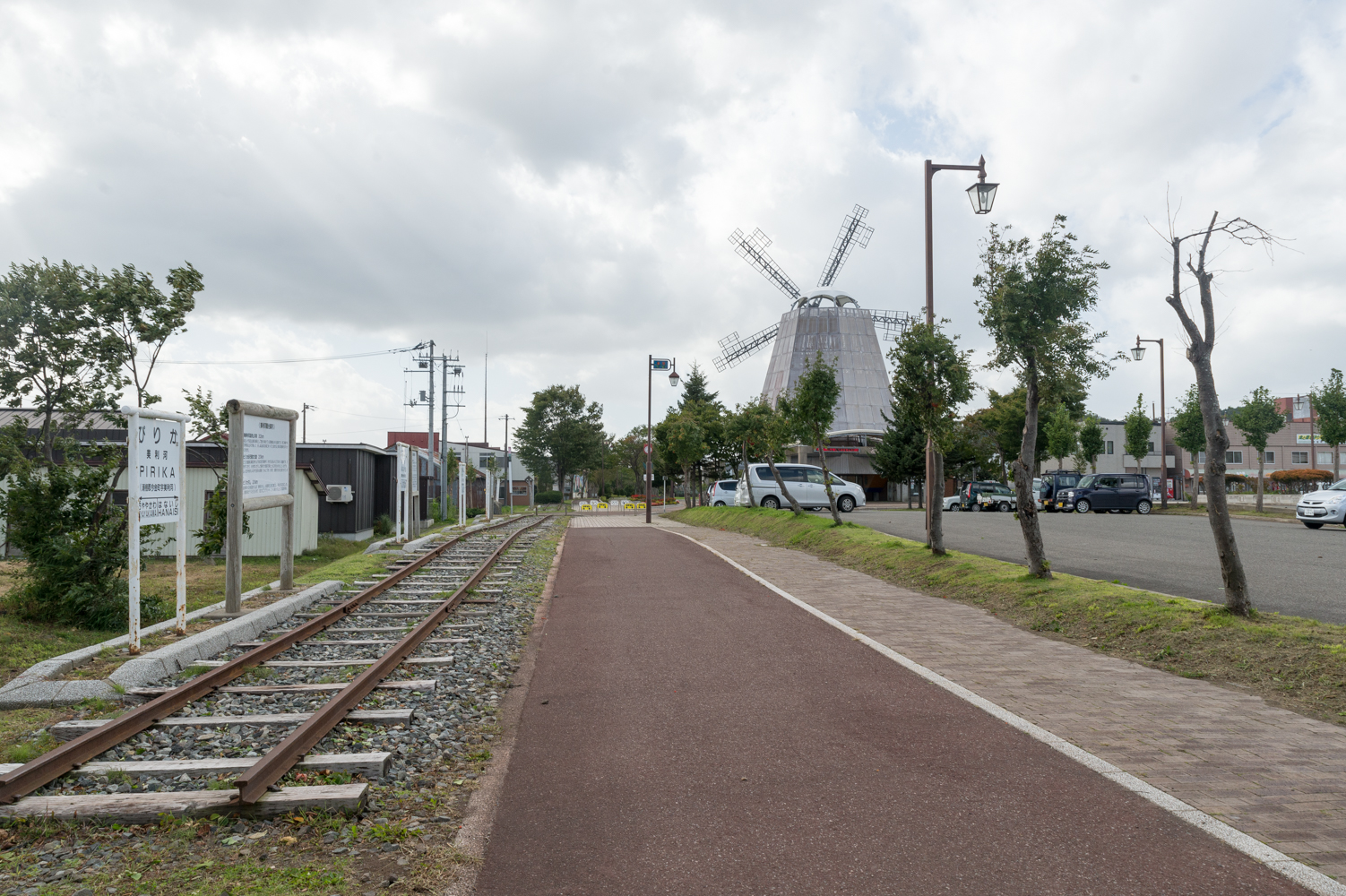 日本国有鉄道瀬棚線今金駅跡地